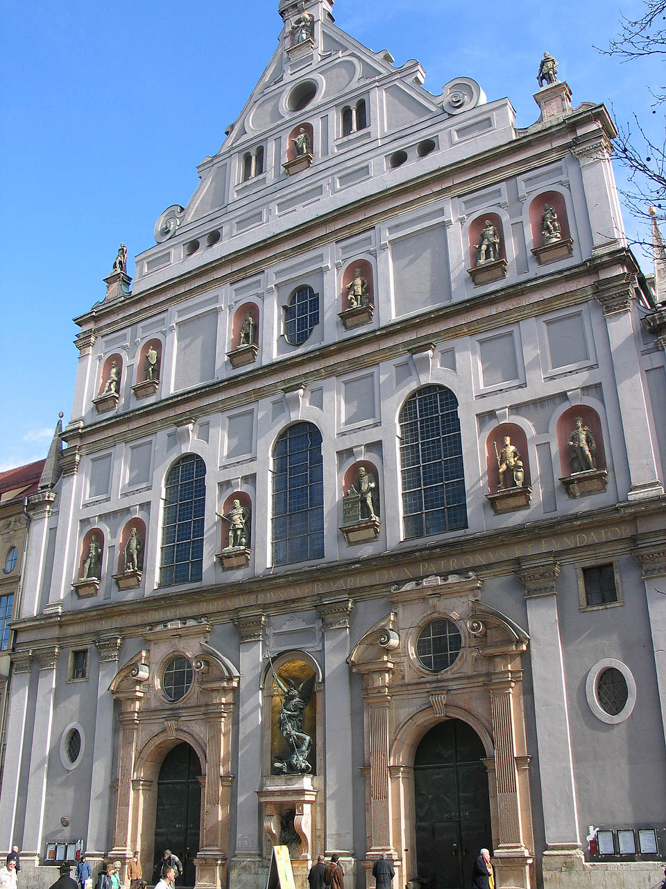 Michaelskirche, München, Bayern, Deutschland